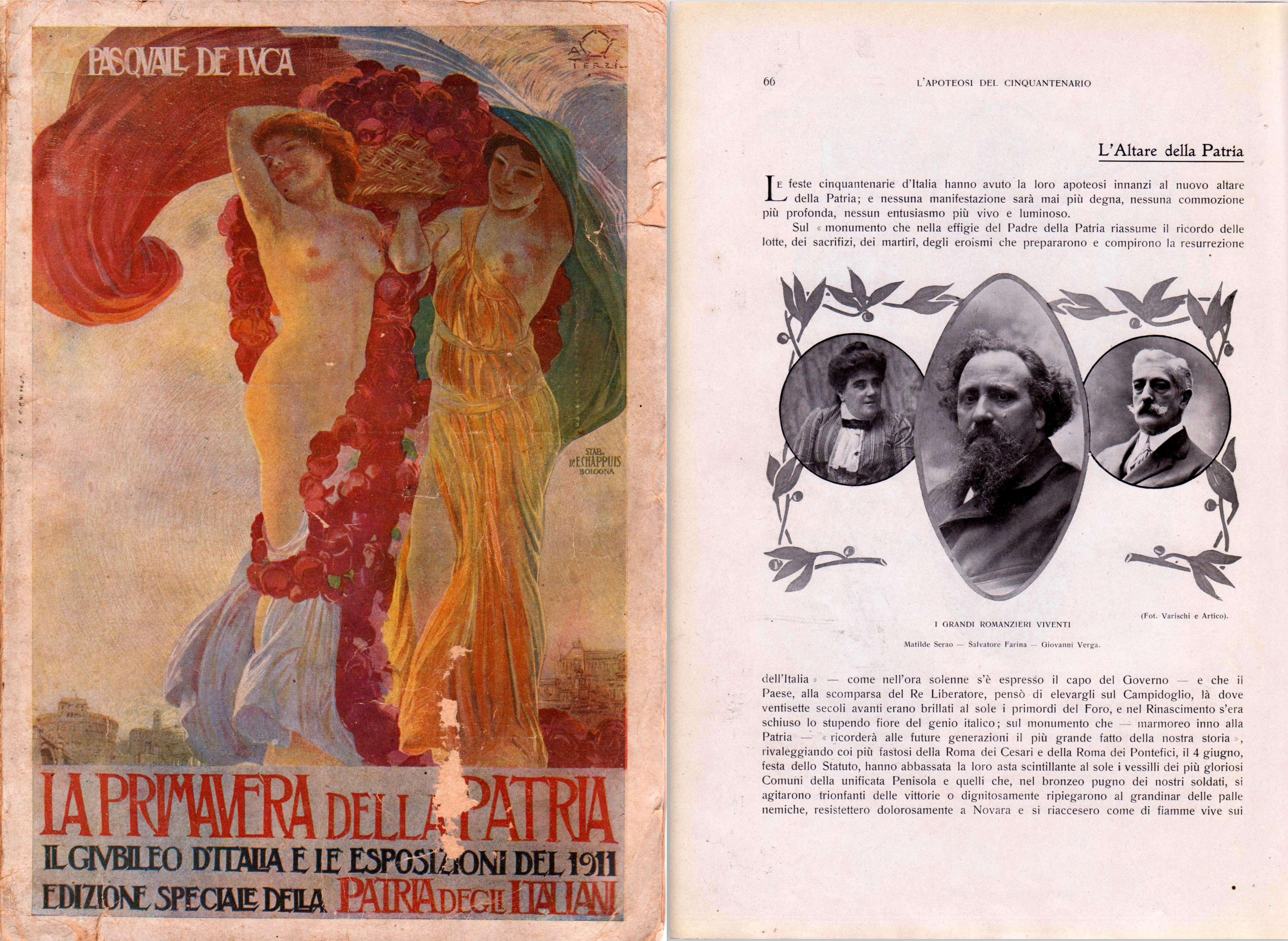 Collage. Scansione della copertina del volume "Il giubileo d'Italia e le esposizioni del 1911" e della pagina in cui è documentato l'uso del sinonimo "Altare della Patria" per il Monumento a Vittorio Emanuele II